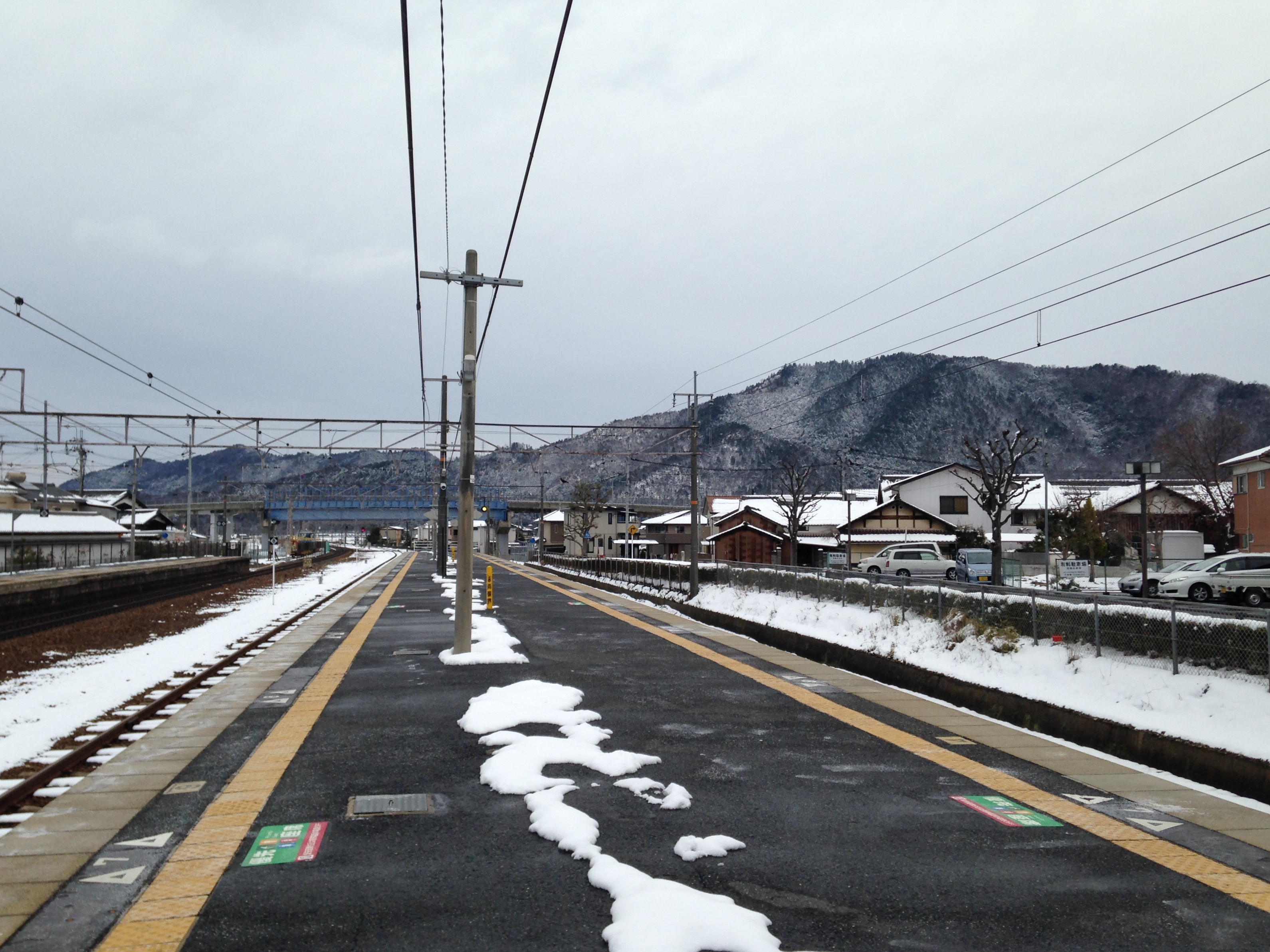 安土駅ホーム(能登川方面)